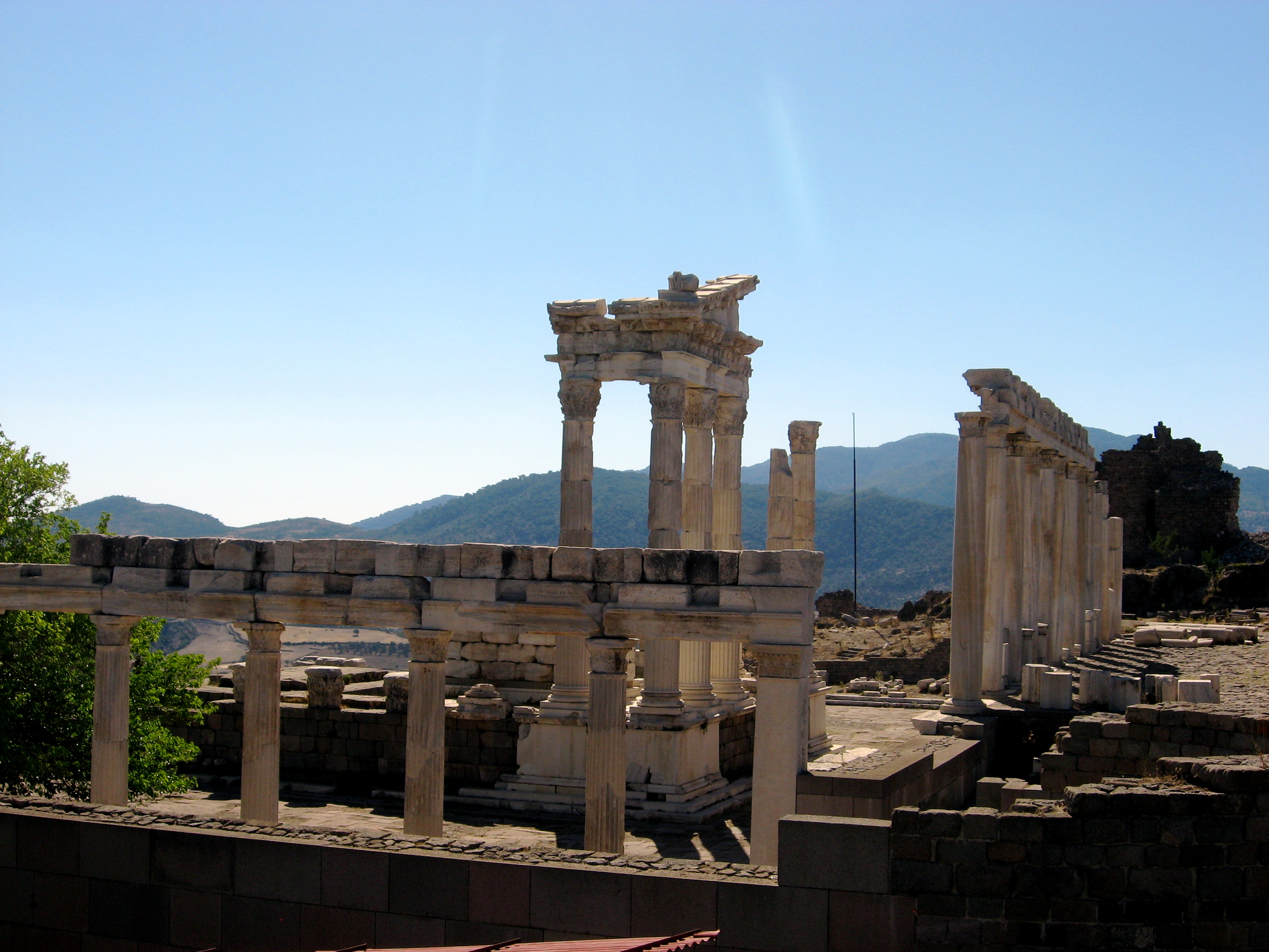 Pergamon